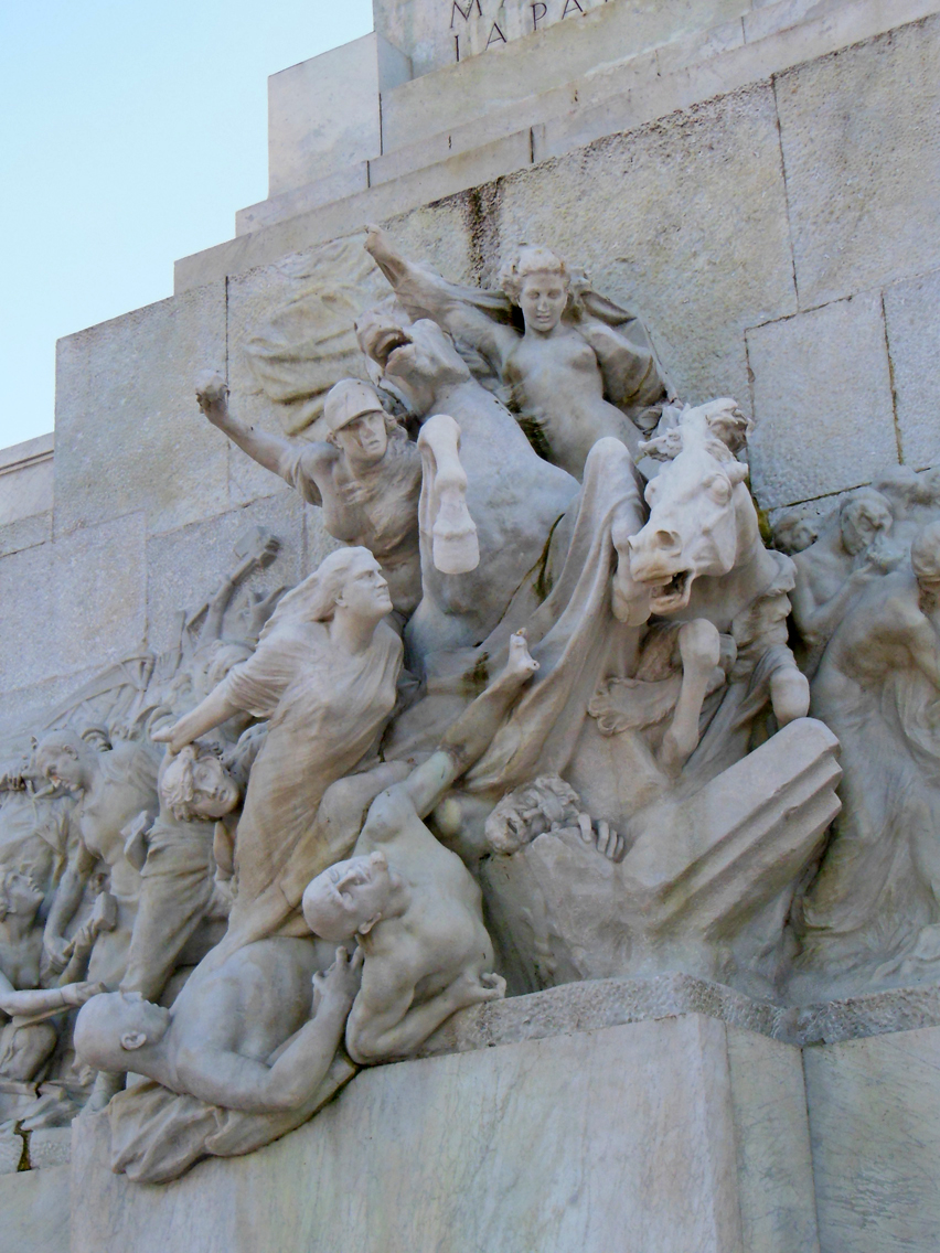 Roma, Monumento a Giuseppe Mazzini di Ettore Ferrari, sculture del basamento, centro del lato frontale